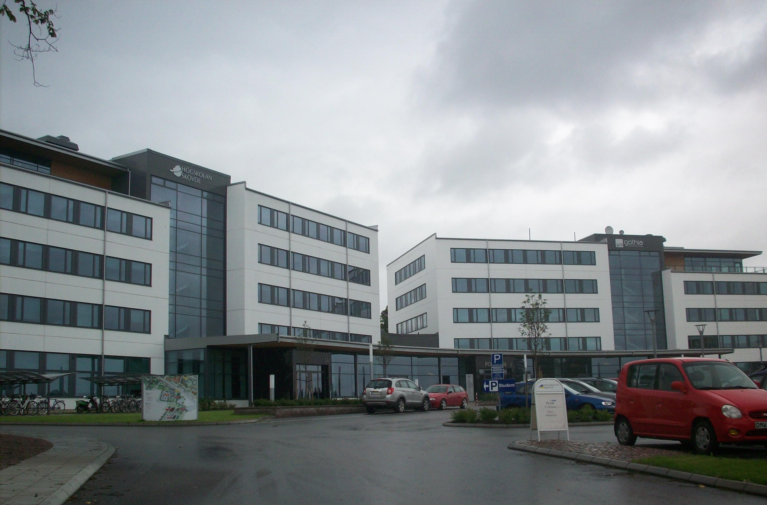 Portalen forsknings- och innovationscentret som ligger i Skövde.